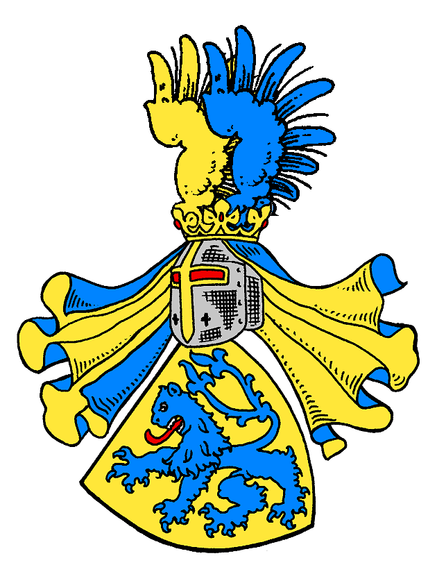 Stammwappen der von Waldstein (Wallenstein), eines bekannten böhmischen Adelsgeschlechts.